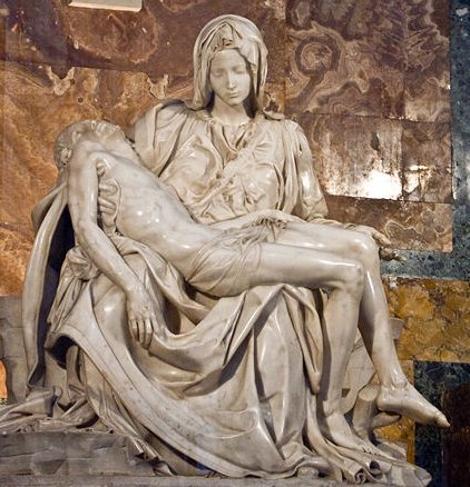 La pieta de Michel Ange. detalle